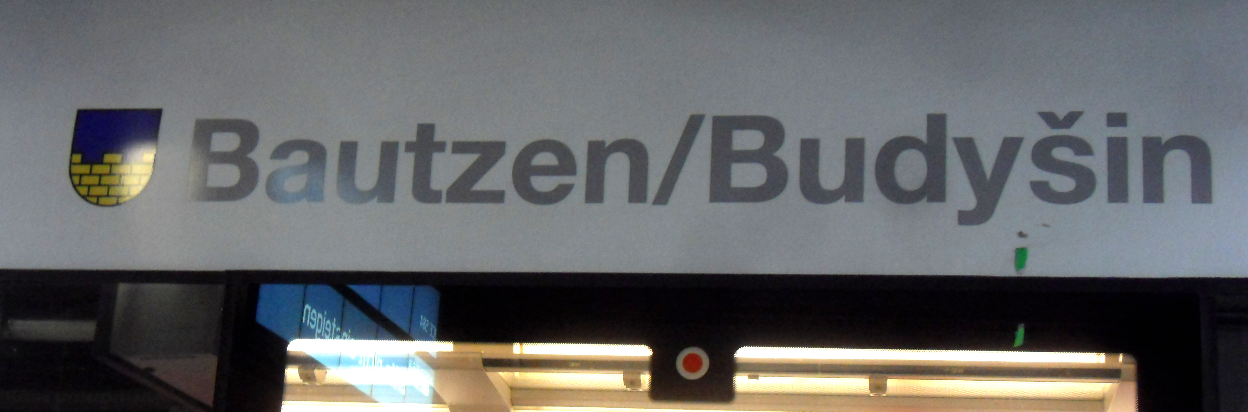 Namensbezeichnung „Bautzen/Budyšin“ des ICE 402 043-4 (Tz 43). Der ICE stand im Hamburger Hauptbahnhof auf Gleis 8.